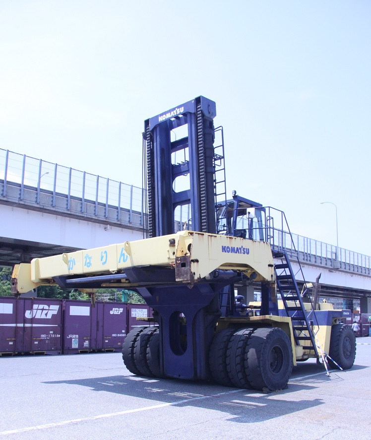 前軸トリプルタイヤ